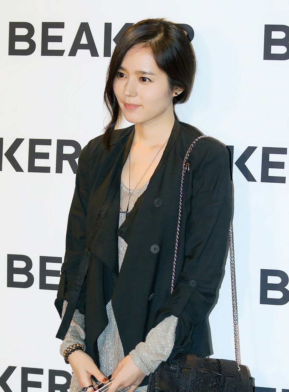 121025-비이커-론칭파티한가인